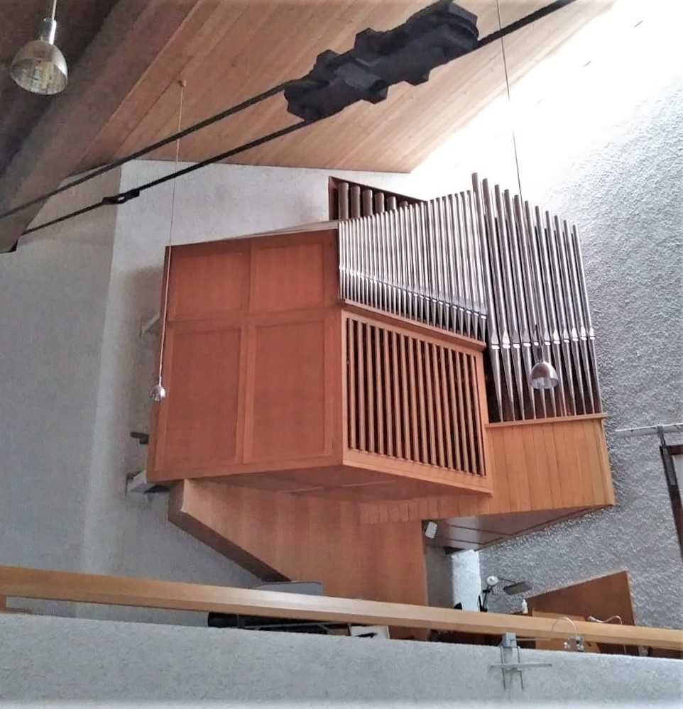 Saint Albertus Magnus Church (Ottobrunn)